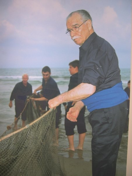 Pescadores de la localidad de Salou,Cataluña, España, ejerciendo el antiguo arte de pesca denominado "Tirar l'art".